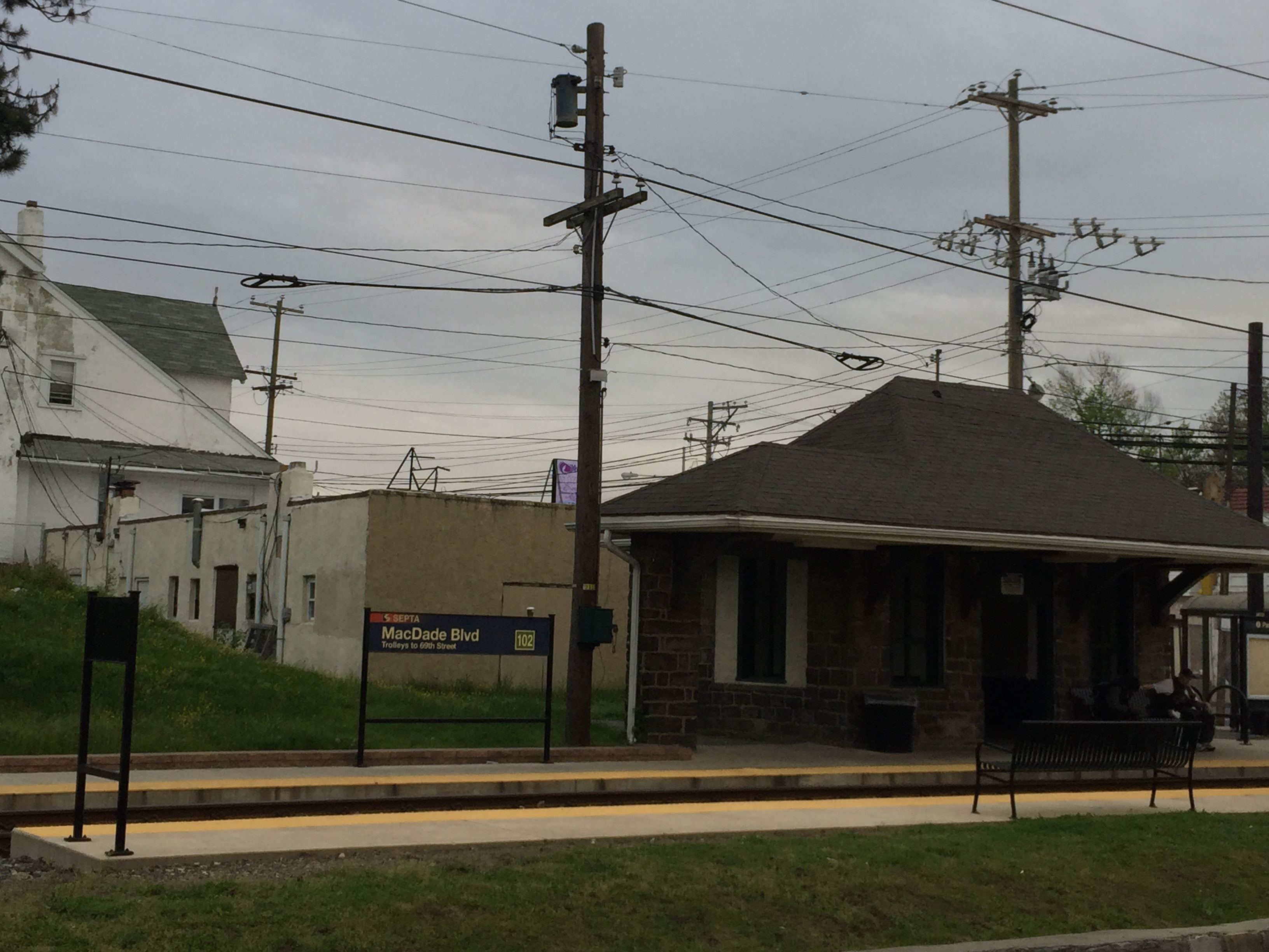 Macdade Blvd station